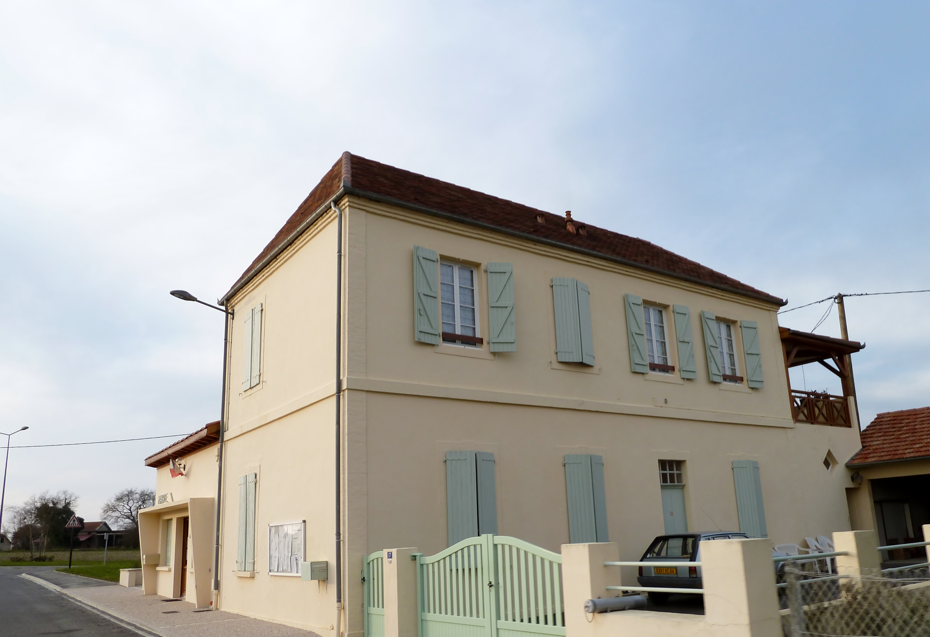 Mairie de Pouliacq